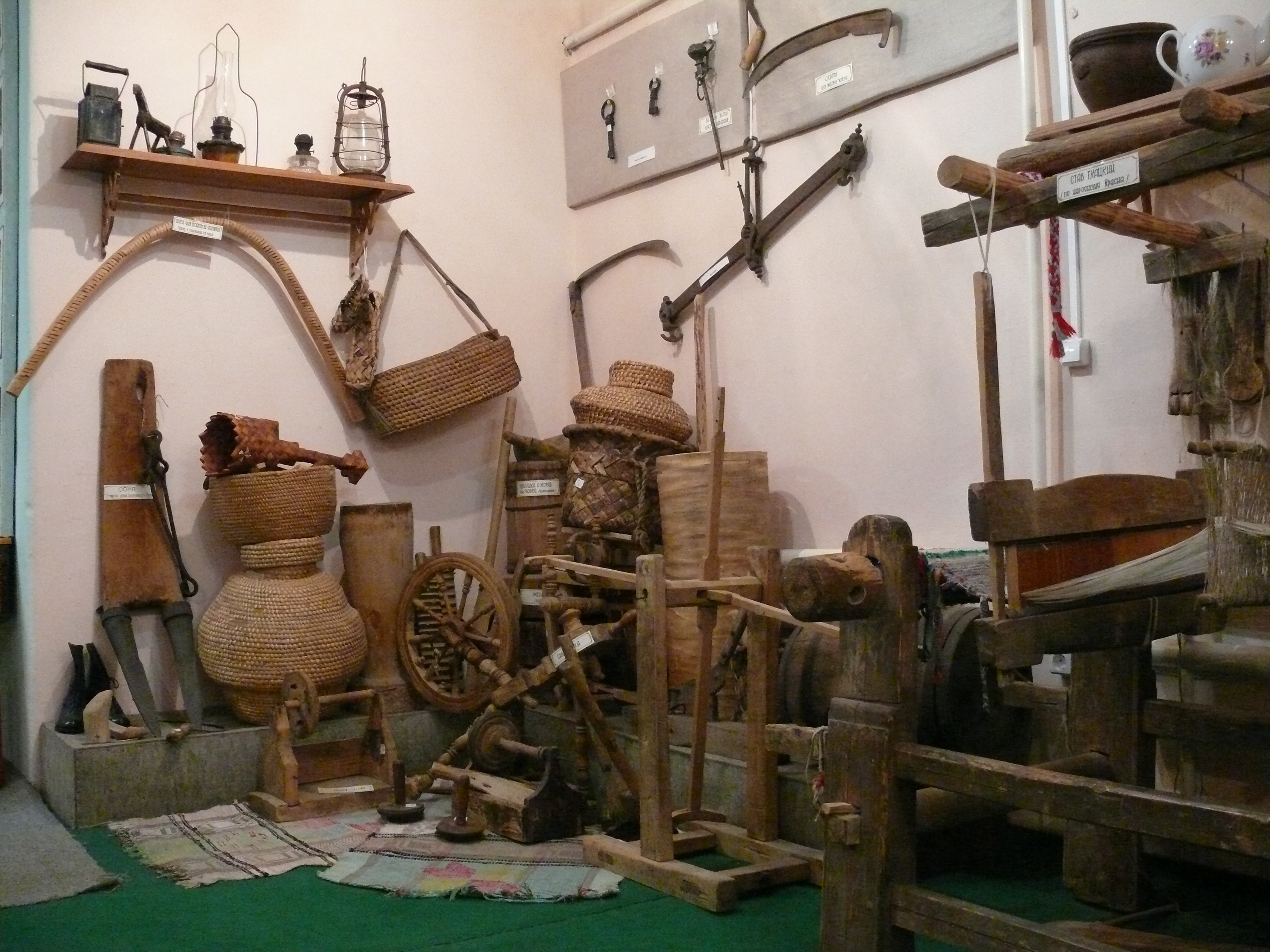 Краеведческий музей в посёлке Шимск Новгородской области